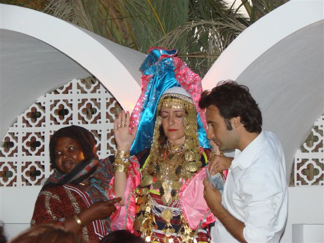 Mariée en tenue traditionnelle de Djerba (cérémonie de la jeloua)